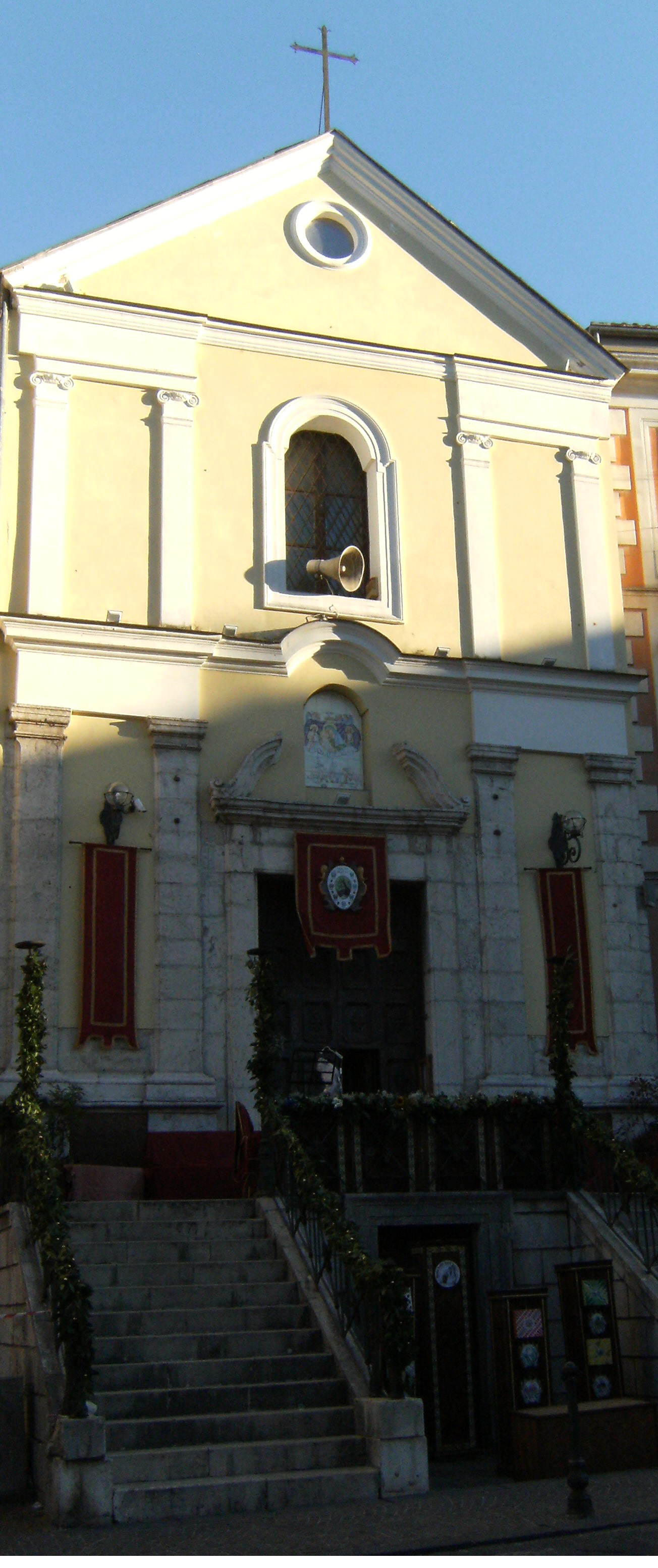 Chiesa di Santa Maria di Costantinopoli di Avellino in occasione del Palio della Botte 2016